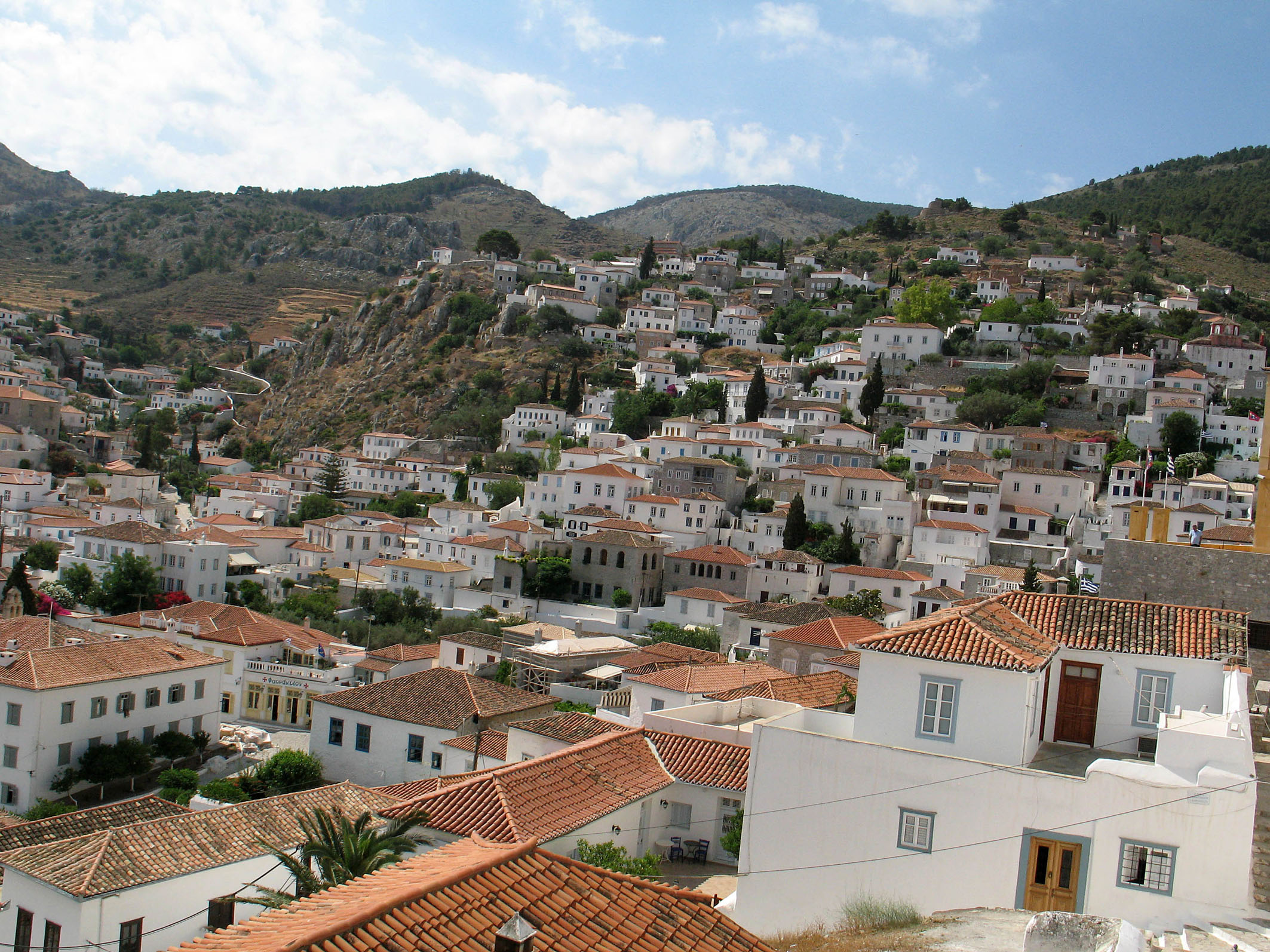 Hydra island